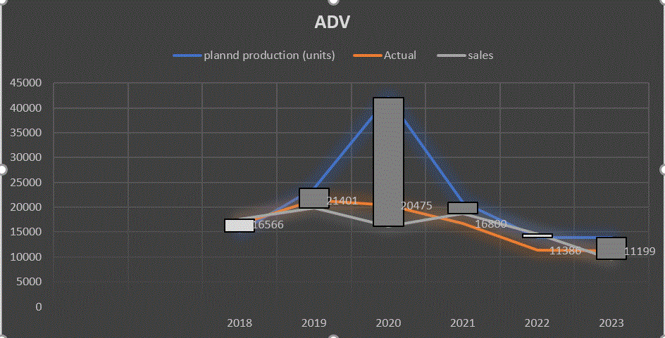 תכנון מול ביצוע בפועל